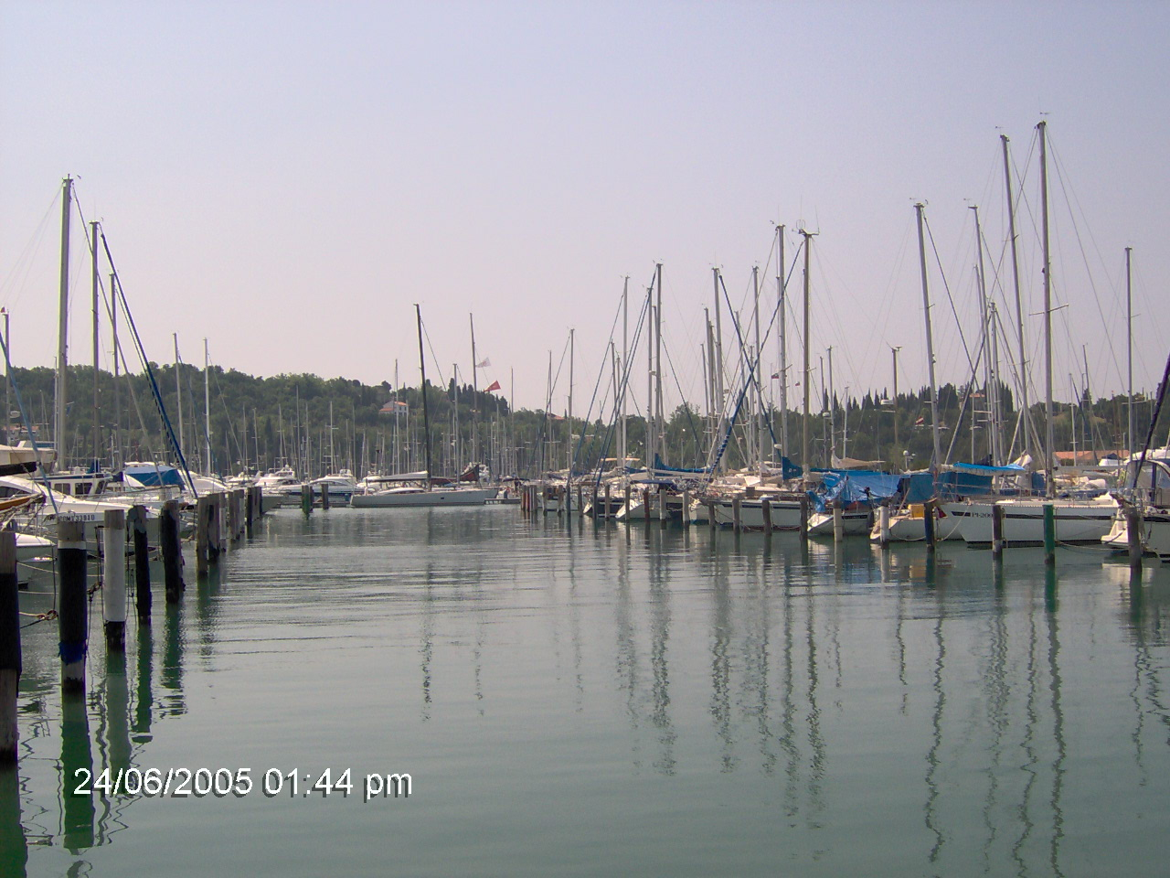 portopoz